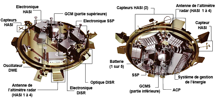 Structure interne de la sonde spatiale Huygens. Légendes en francais.